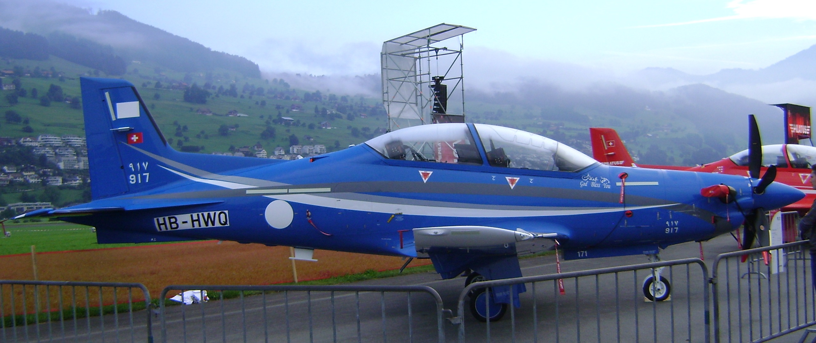 Saudi Pc-21